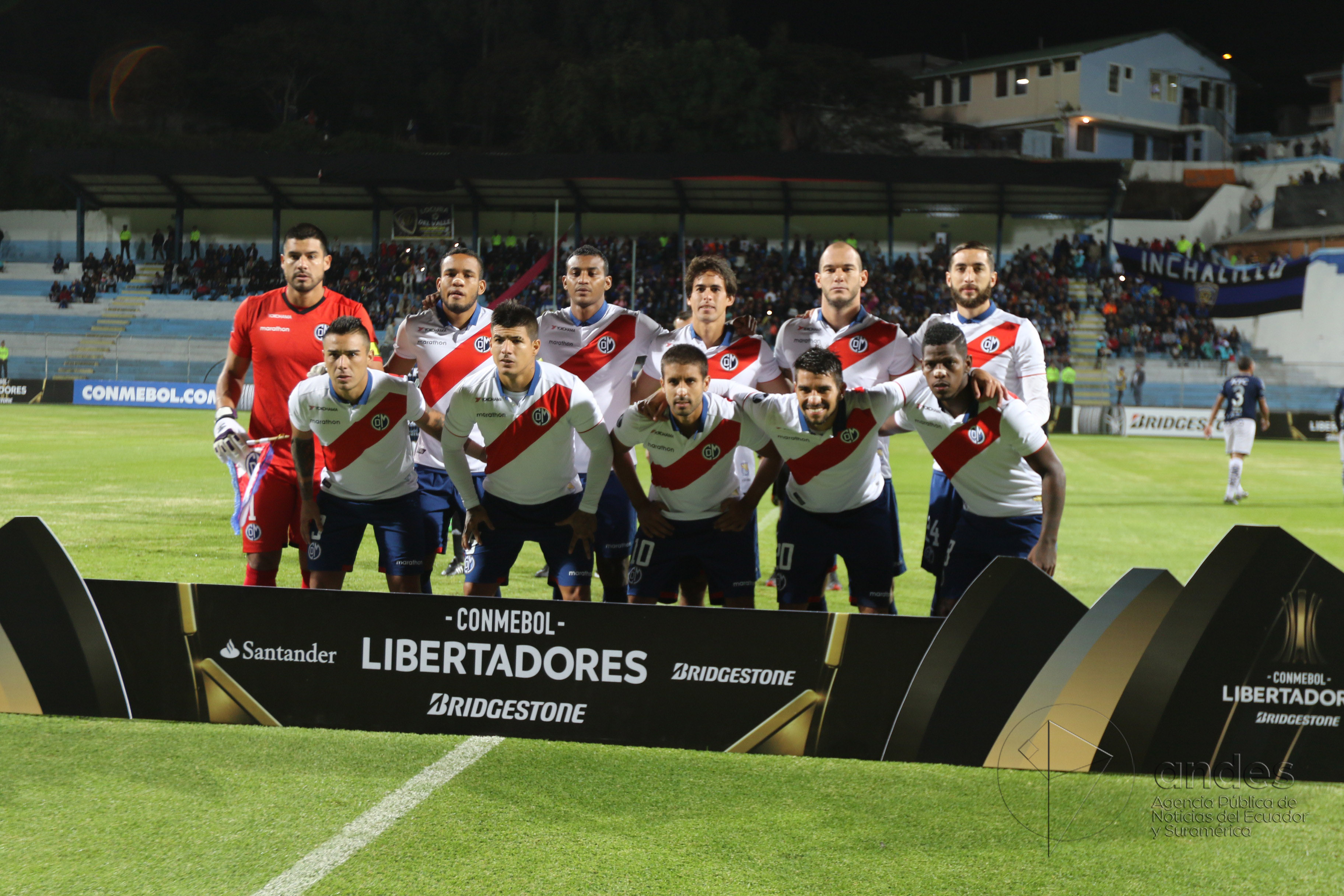 IDV vs MUNICIPAL